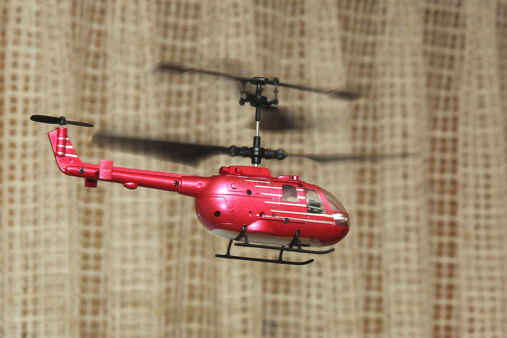 Revell Micro Heli Demonstrator GSY-IR RTF (24034), ca. 15 cm lang, Rotordurchmesser 14 cm, Fluggewicht 24 g; nur in Innenräumen einzusetzen